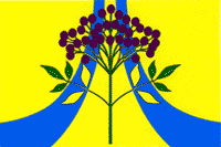 Флаг Бузиновского сельского поселения, Краснодарский край, Россия